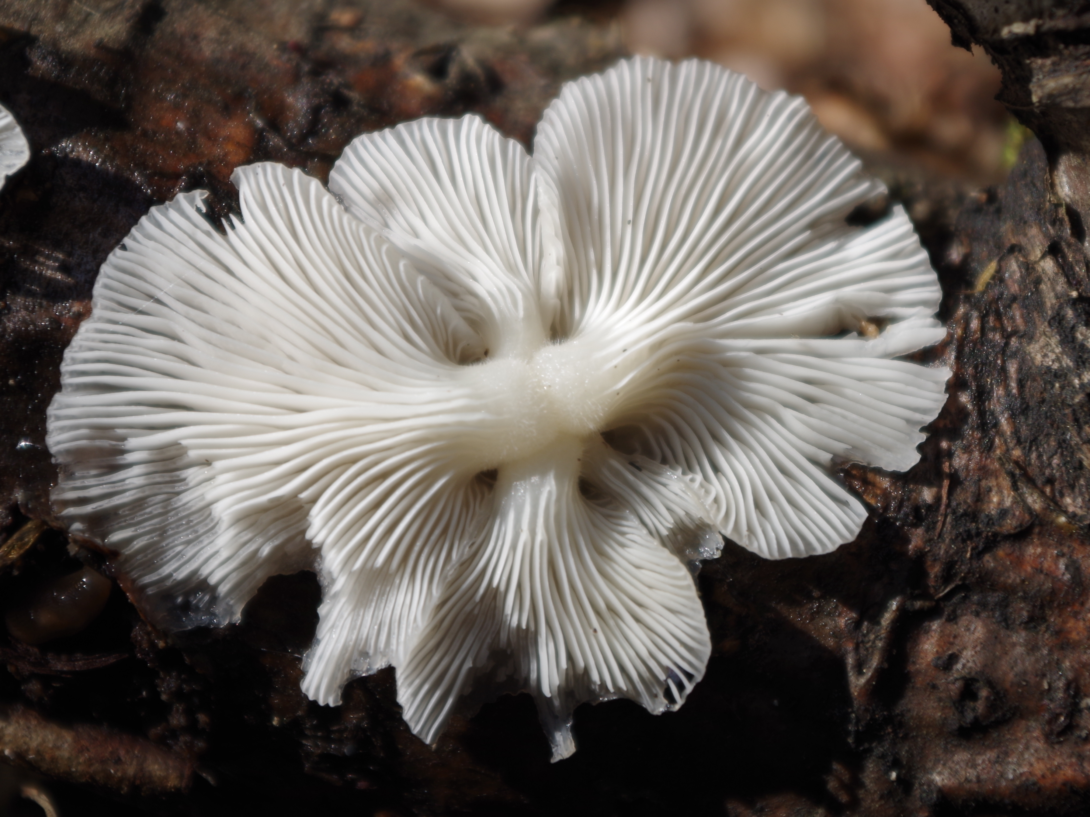 Panellus mitis (location: Poland, Leszczyna, województwo małopolskie)